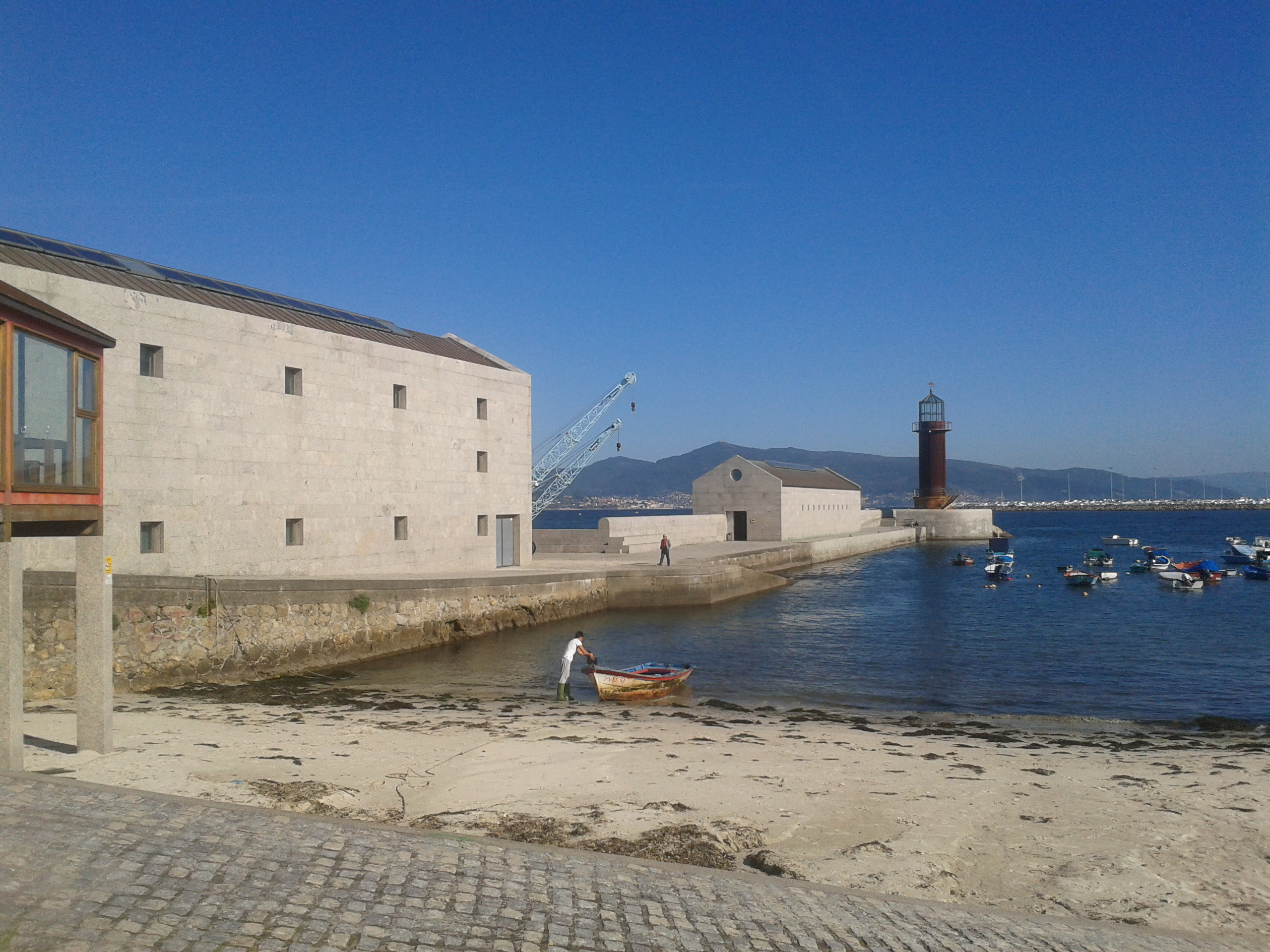 museo do mar en vigo